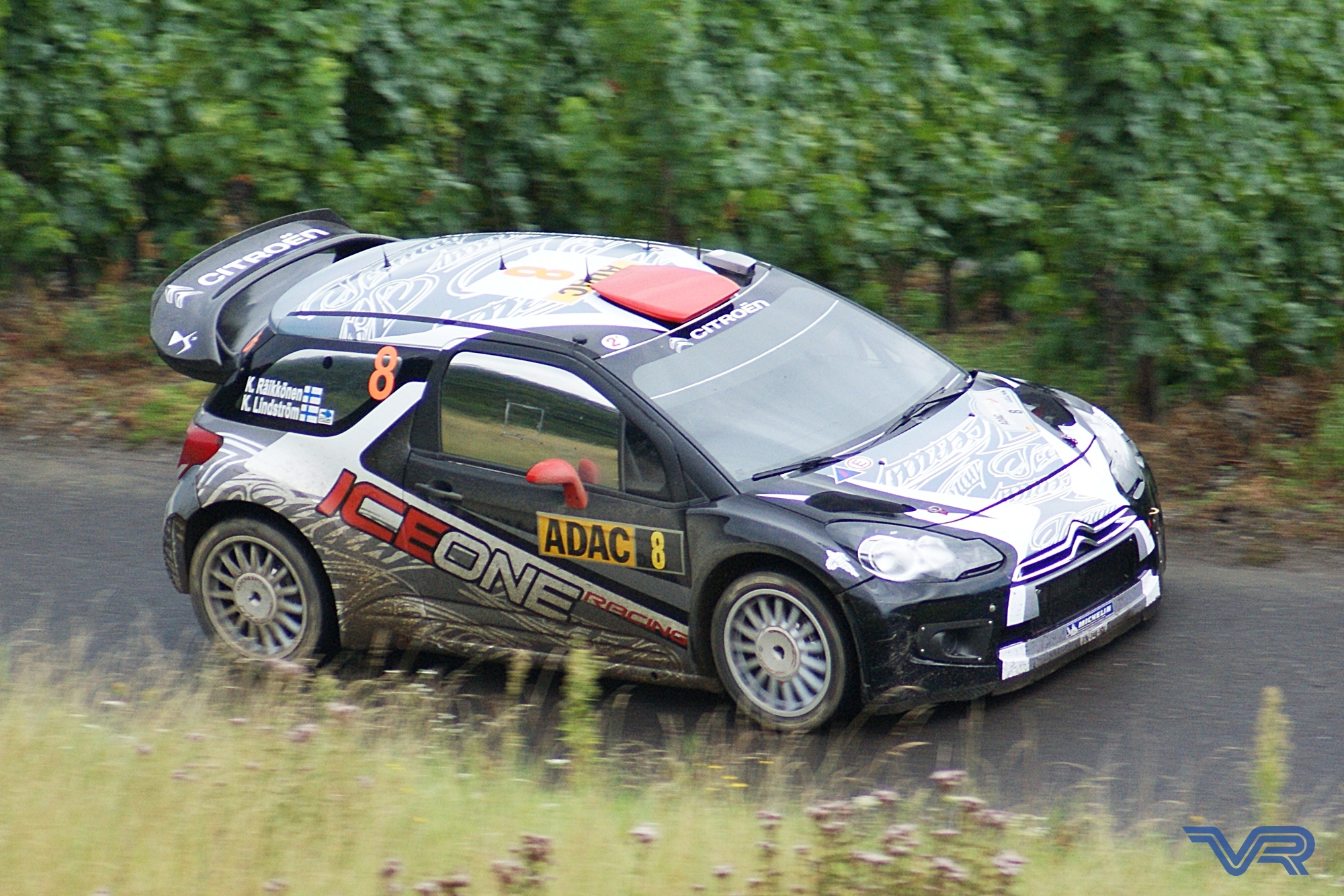 Kimi Räikkönen podczas rajdu Niemiec 2011, OS17 Dhrontal 2